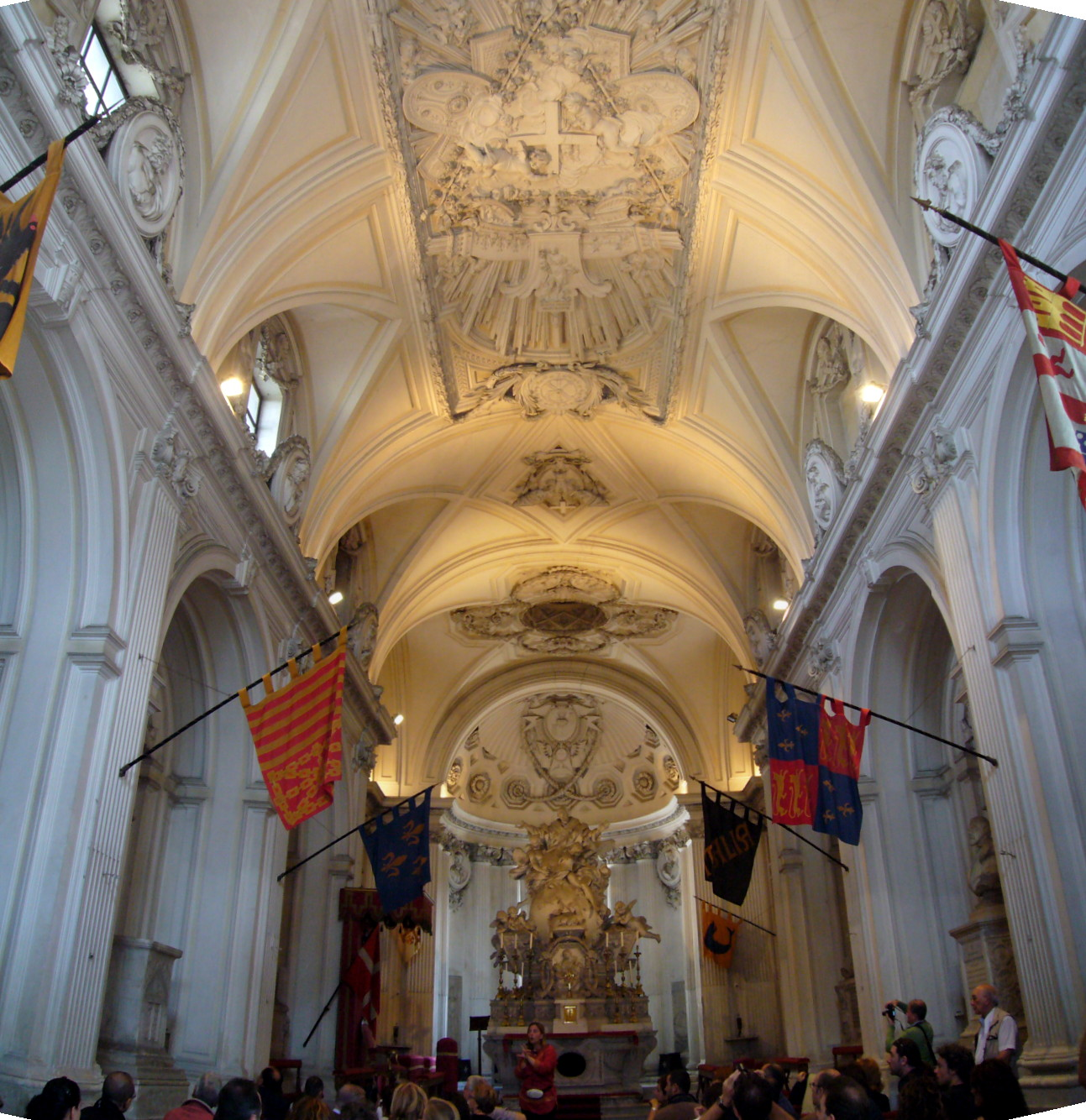 Roma, Villa del Priorato dei Cavalieri di Malta: Santa Maria del Priorato, interno